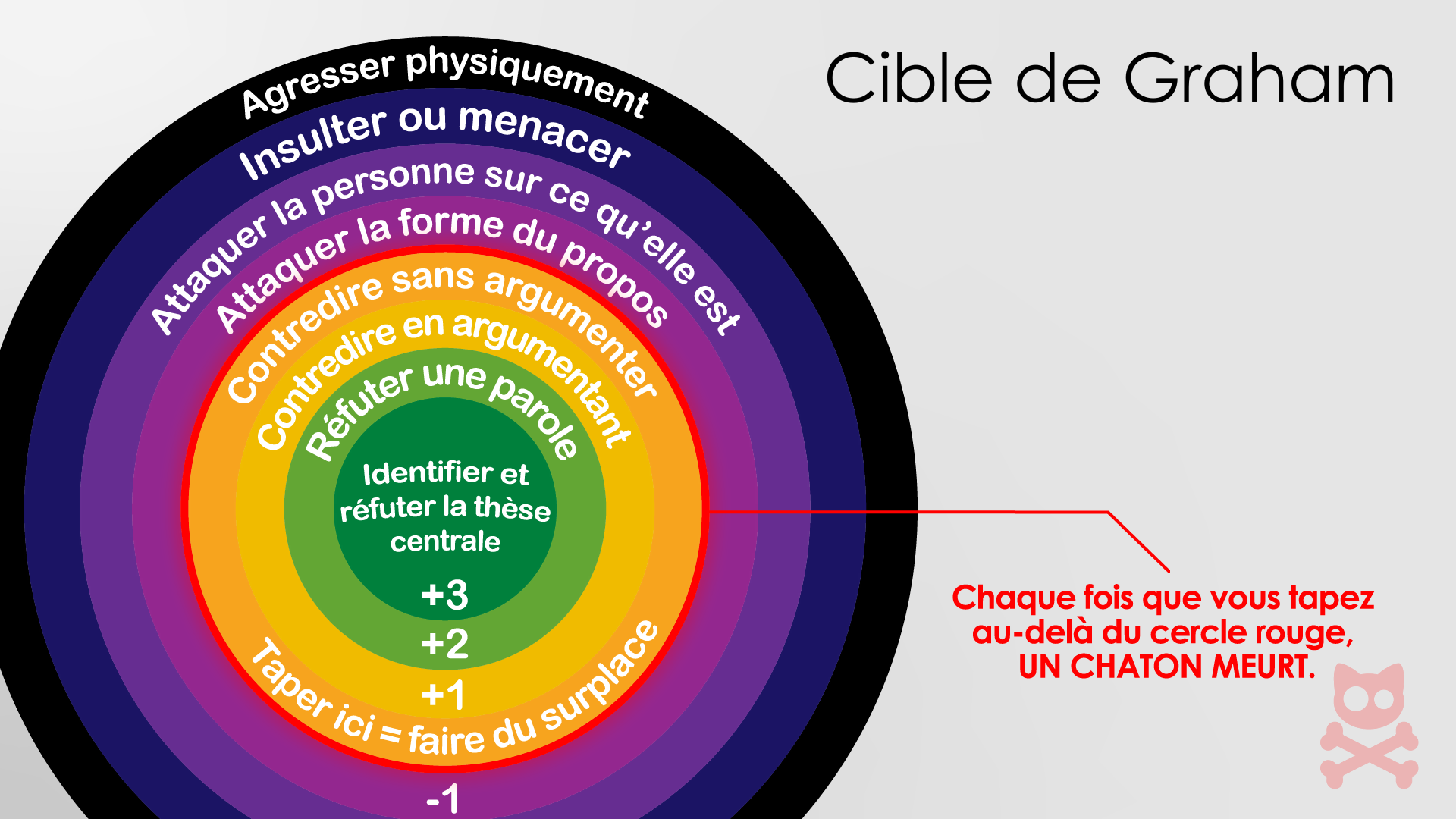 La "Cible de Graham, ou l'art d'exprimer son désaccord".